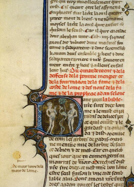 La mort de l'âme. Extrait de la Bible historiale.